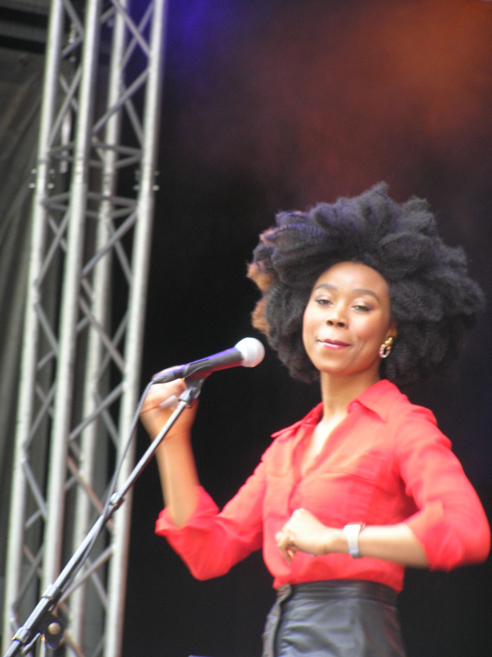 Ntjam Rosie tijdens het International Jazz Festival Middelburg 2013